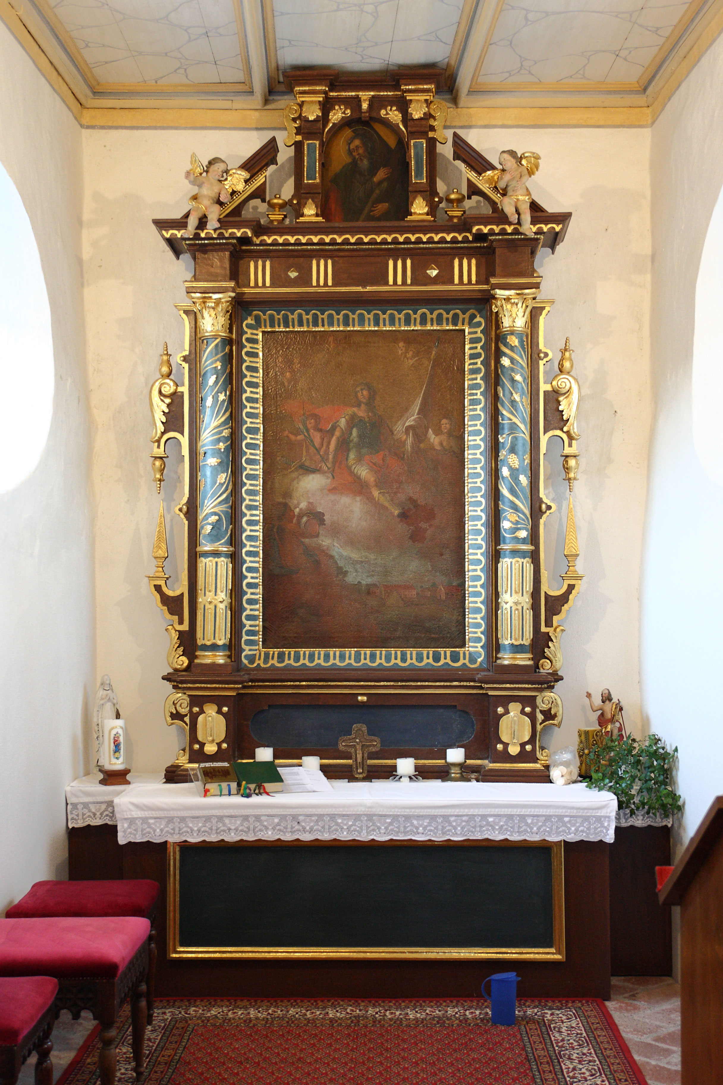 Kath. Kapelle Sankt Mauritus in Doldenhausen (Mindelheim). Altar von 1675 mit Bild des hl.Mauritius